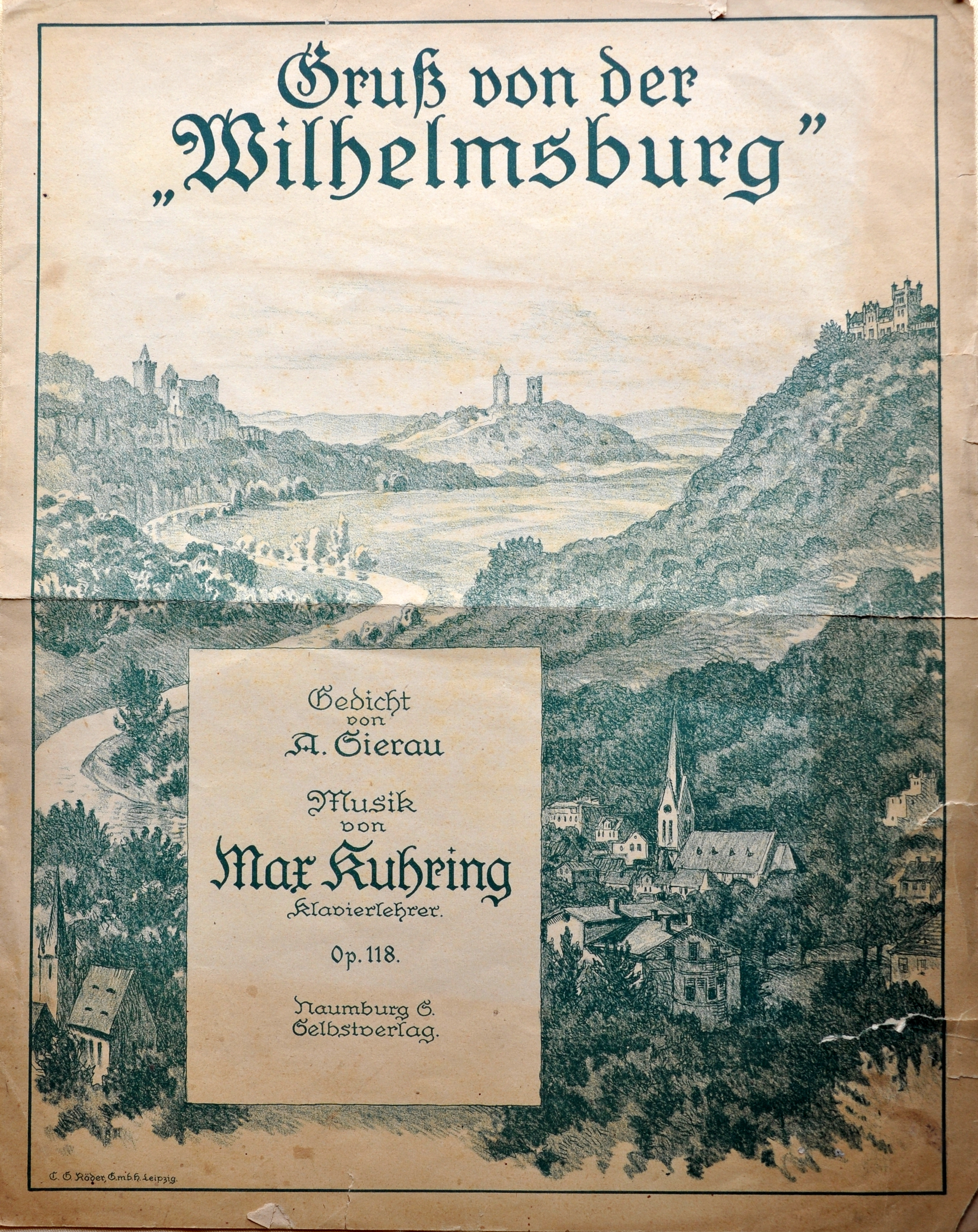 Deckblatt zu einem vom Naumburger Klavierlehrer und Komponisten Max Kuhring vertonten Gedicht von August Zierau. Der Druck erfolgte von der C. G. Röder GmbH in Leipzig. Das Blatt zeigt oben links die Rudelsburg bei Bad Kösen, mittig die Burg Saaleck und rechts die Restauration Wilhelmsburg. Unten ist die Stadt Bad Kösen (seit 2010 nach Eingemeindung Ortsteil der Stadt Naumburg) abgebildet.